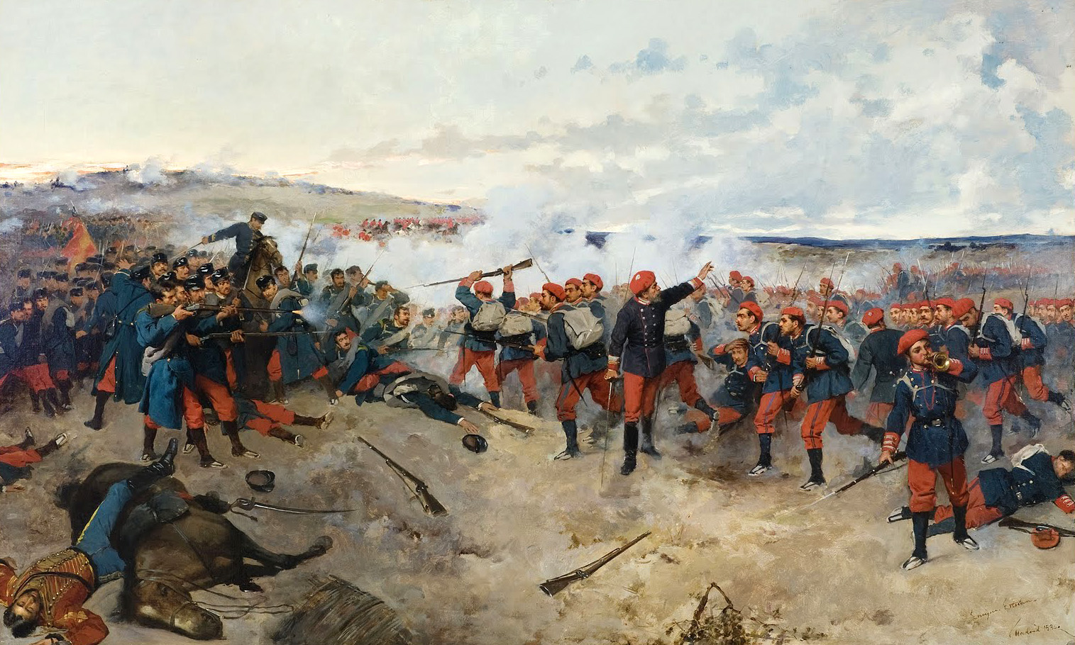 La obra representa a los soldados carlistas cargando en la batalla de Lácar, librada el 3 de febrero de 1875 y en la que el rey Alfonso XII de España estuvo a punto de ser apresado por los carlistas.